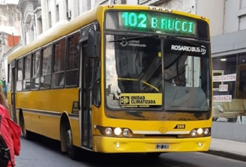 Mercedes-Benz de la empresa Rosario Bus, explotadora de la línea 102